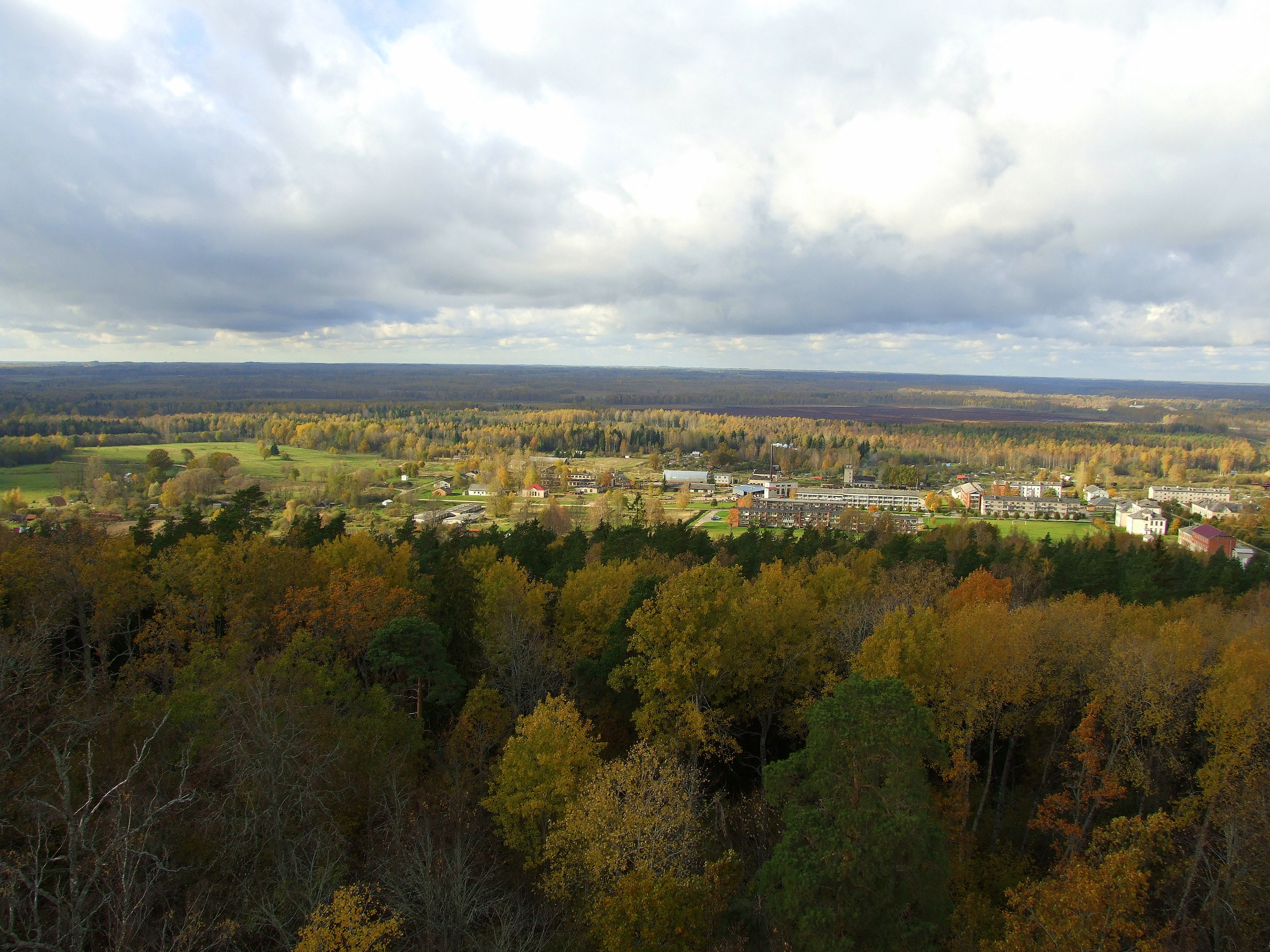 Zilaiskalns